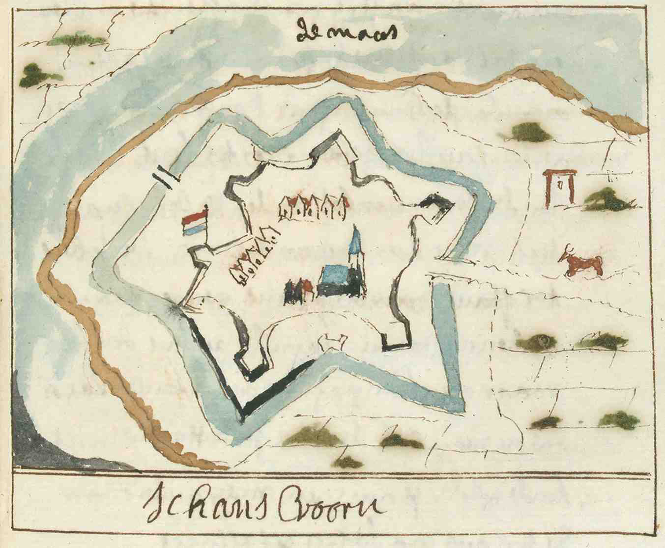 Beschrijving van Gelderland door Schoemaker